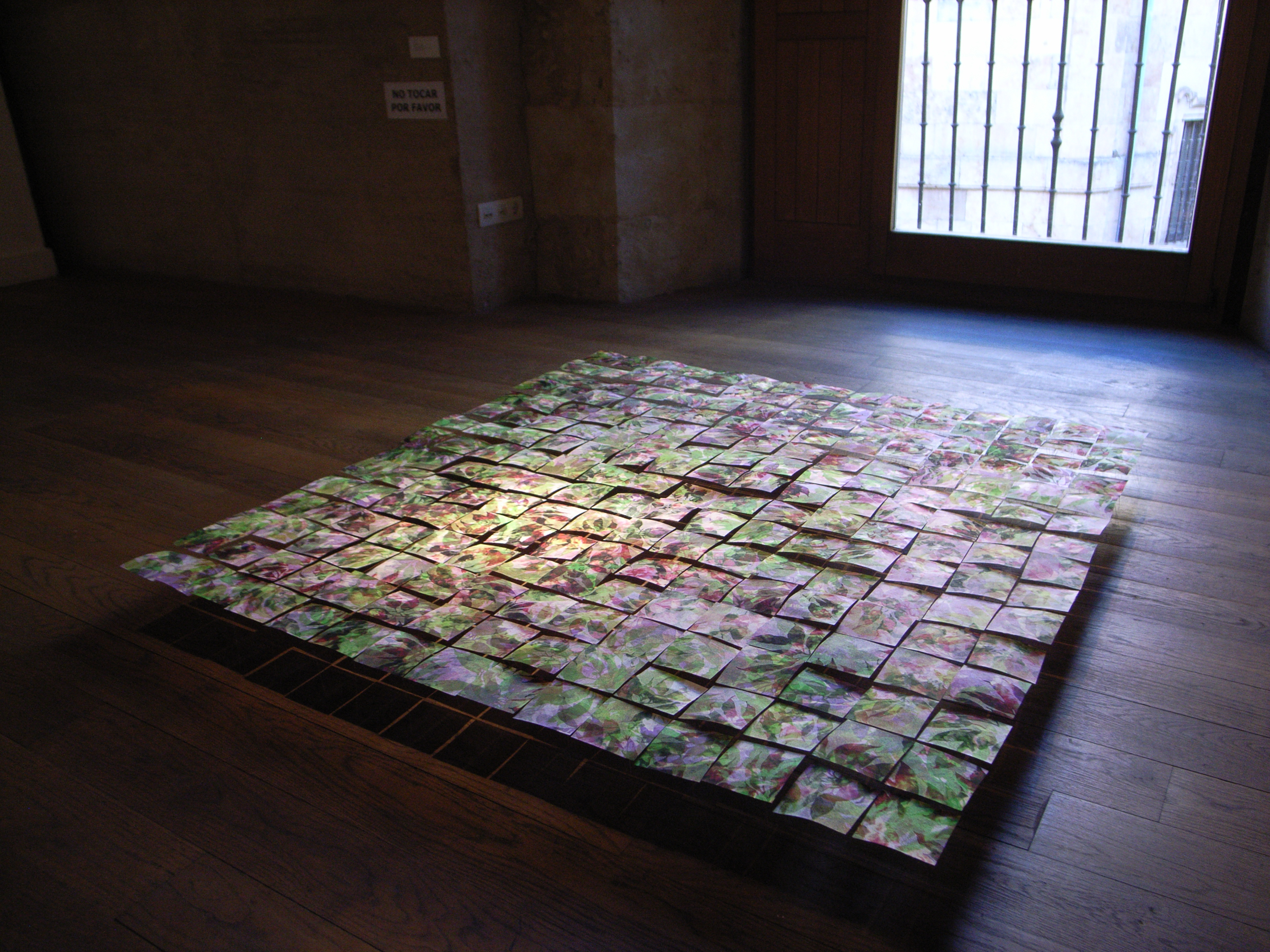 SPAIN、SALAMANCAとMADRIDで開催された THE NATURE SPIRIT 日本の現代テキスタイル作家16人展出品作